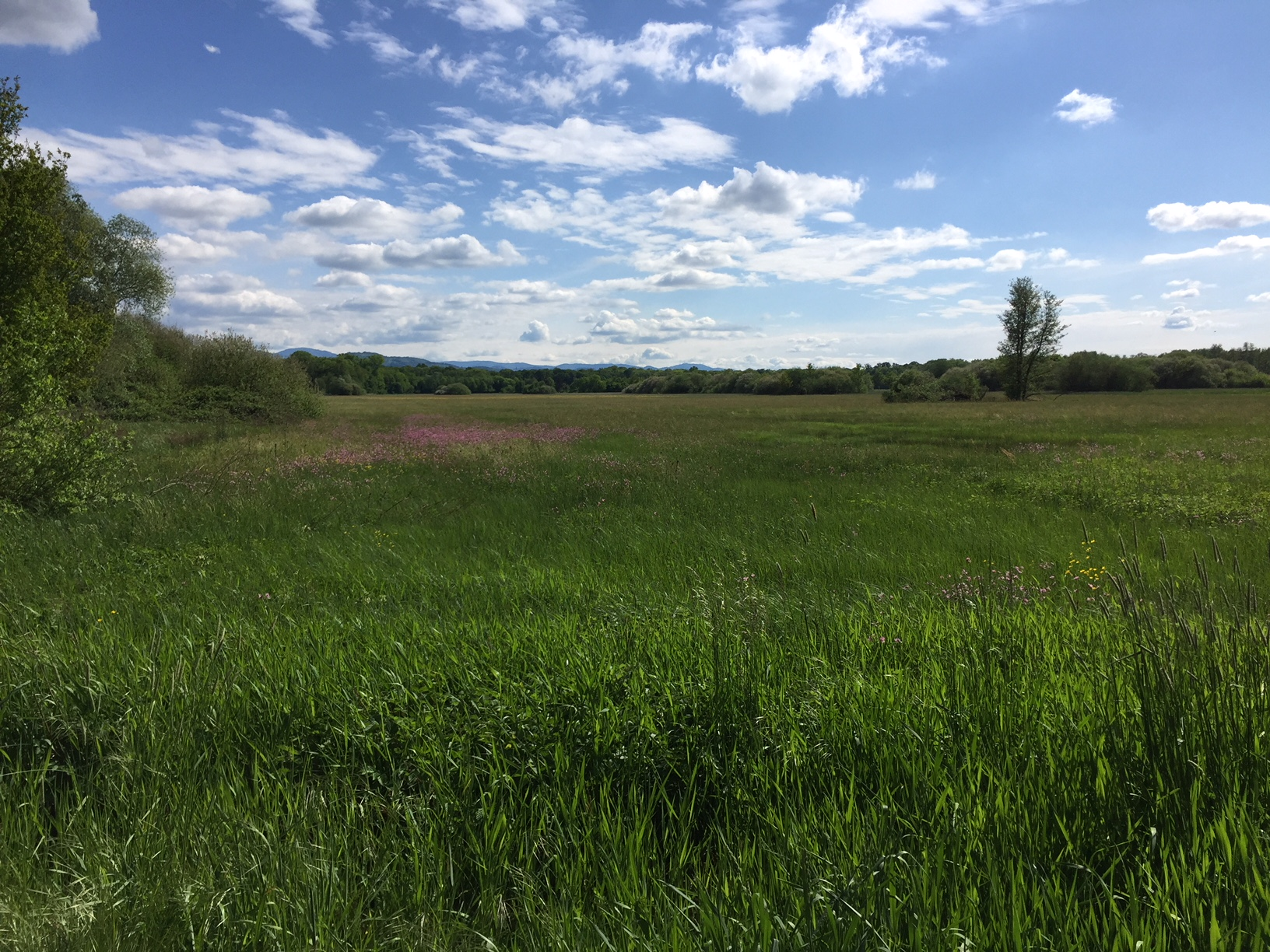 Naturschutzgebiet Mühlmatten (Feuchtwiesengebiet) bei Freiburg-Hochdorf